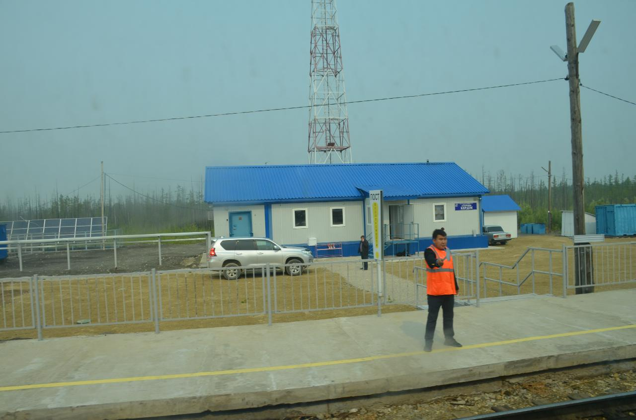 Поездка 5-6 августа 2019 г. по маршруту Якутск - Нерюнгри - Якутск во вновь назначенном поезде № 327 Нижний Бестях - Нерюнгри. Историческое событие - пуск пассажирского движения поездов из центральной Якутии, почти из Якутска. Станция Кердем (73 км)